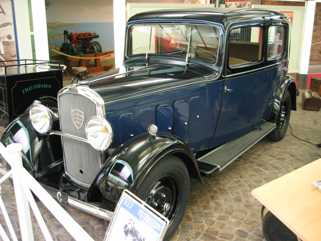 Peugeot 301 - Musée Peugeot Sochaux.